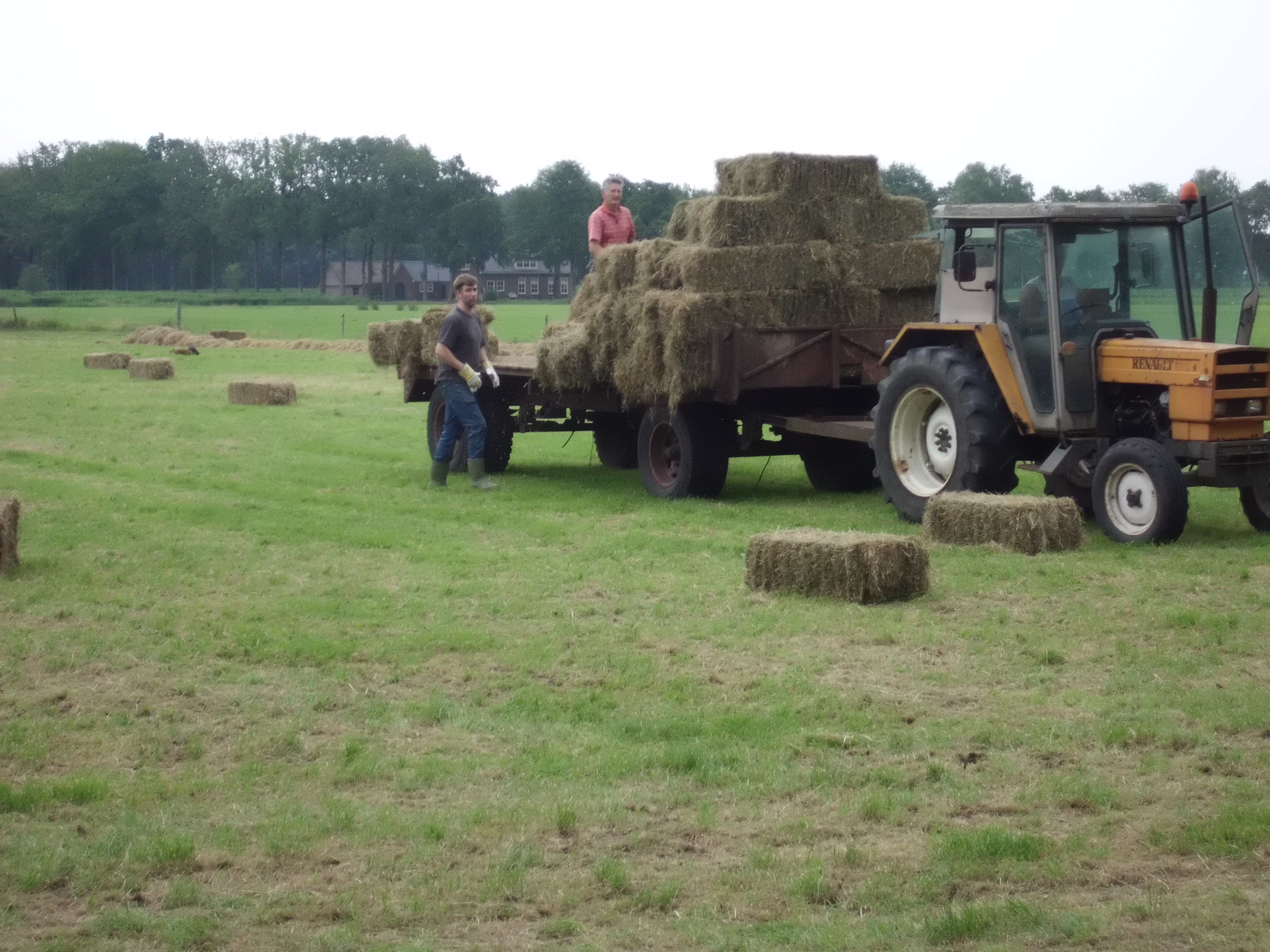 Handmatig hooibalen laden op een platte wagen